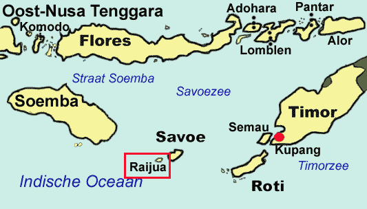 Ligging van Raijua in Oost-Nusa Tenggara (Indonesië). Eigen werk, gebaseerd op afbeelding van Wybe, PD.